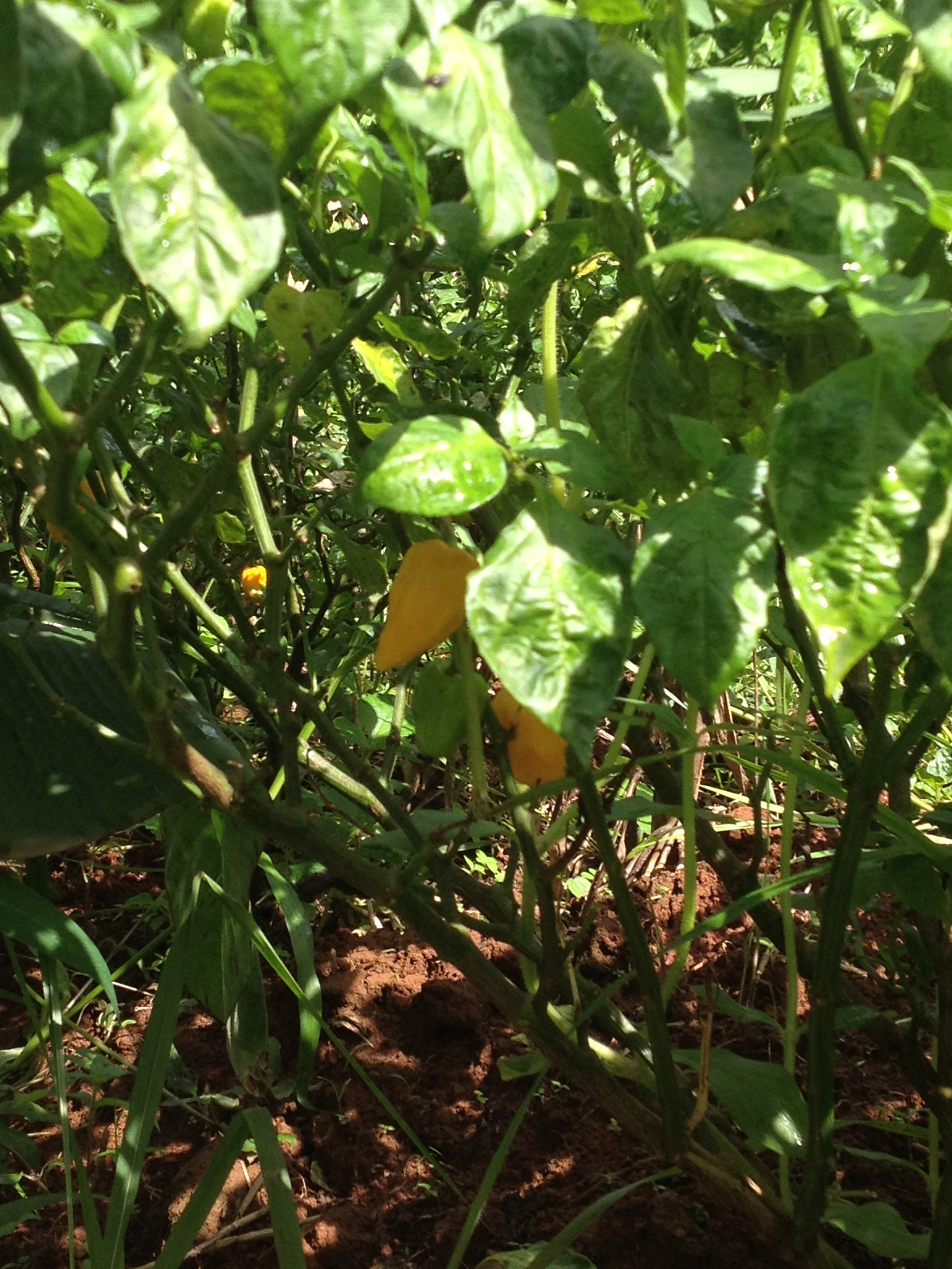 Bamena Cultures